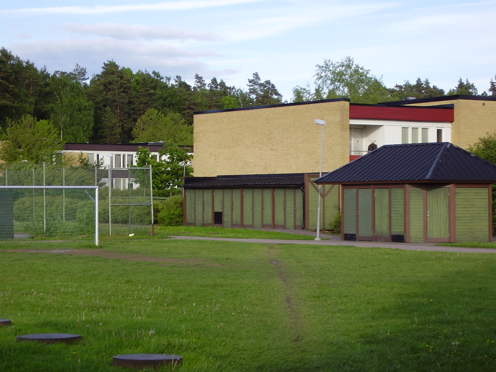 Människoryd Foto:Lavas.